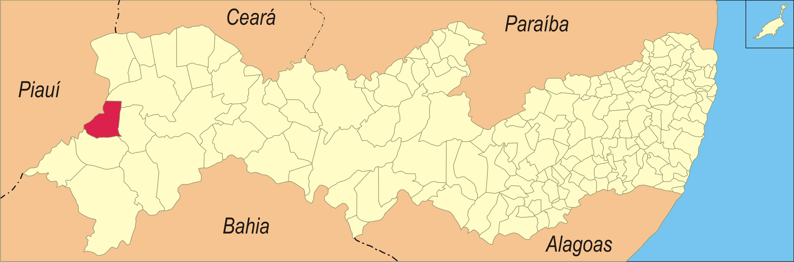 Localização da cidade em Pernambuco